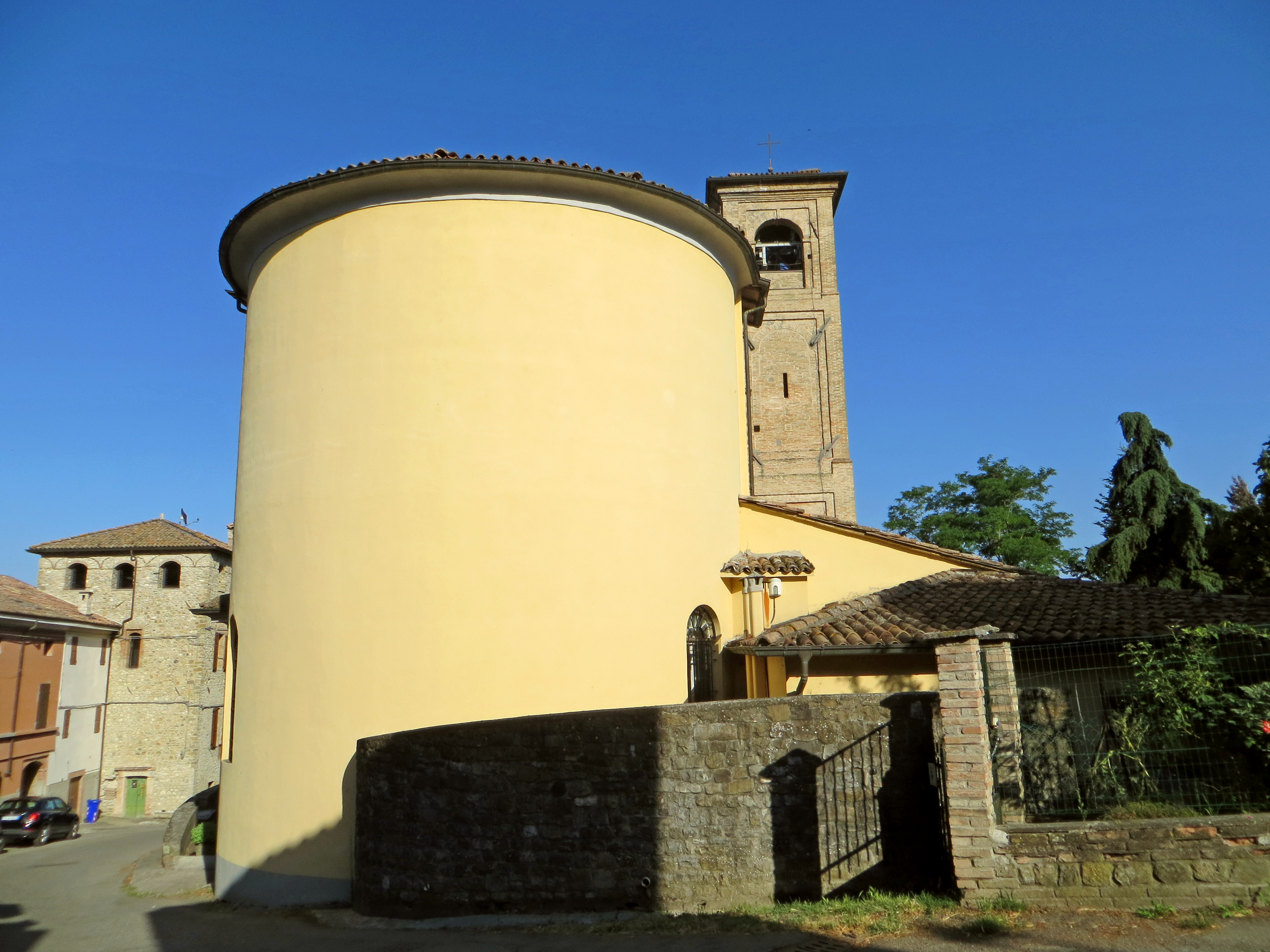 Chiesa di San Vitale (San Vitale Baganza, Sala Baganza) - abside This is a photo of a monument which is part of cultural heritage of Italy.